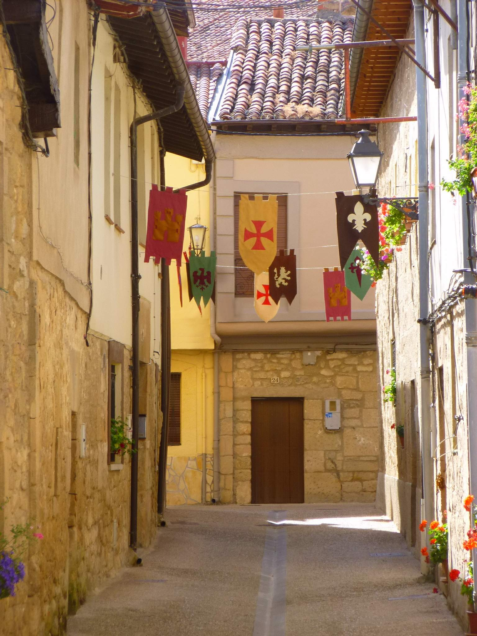 Santa Gadea del Cid (Burgos)